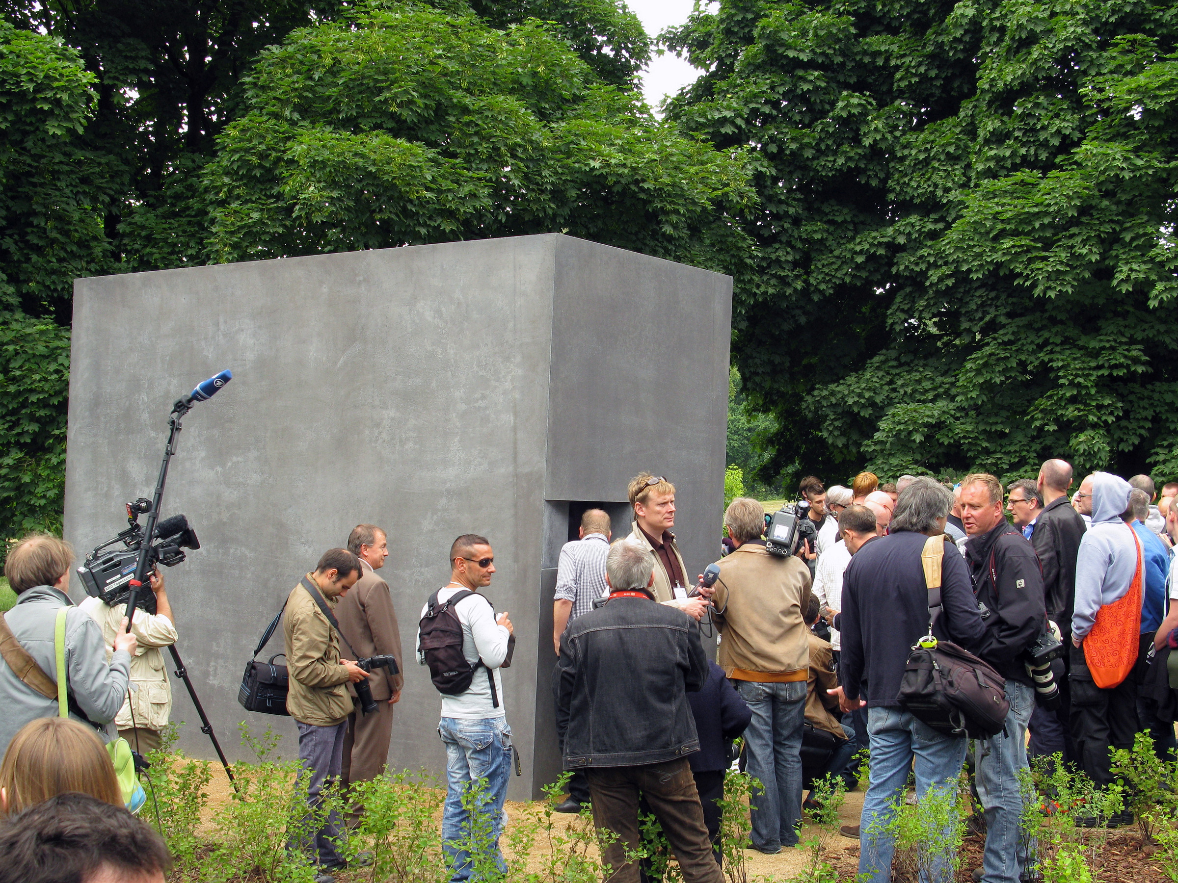 Presseandrang bei der Eröffnung des Denkmals für die im Nationalsozialismus verfolgten Homosexuellen, 27. Mai 2008, Berlin-Tiergarten